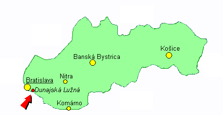 Overview of Slovakia with major cities and location of Dunajska Luzna / Prehlad Slovenska s velkymi mestami a polohou Dunajskej Luznej